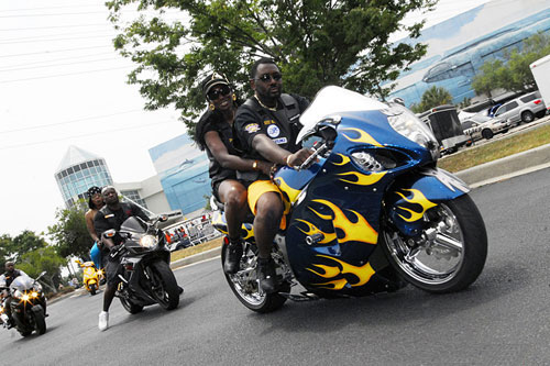 Black Bike Week Festival 2008